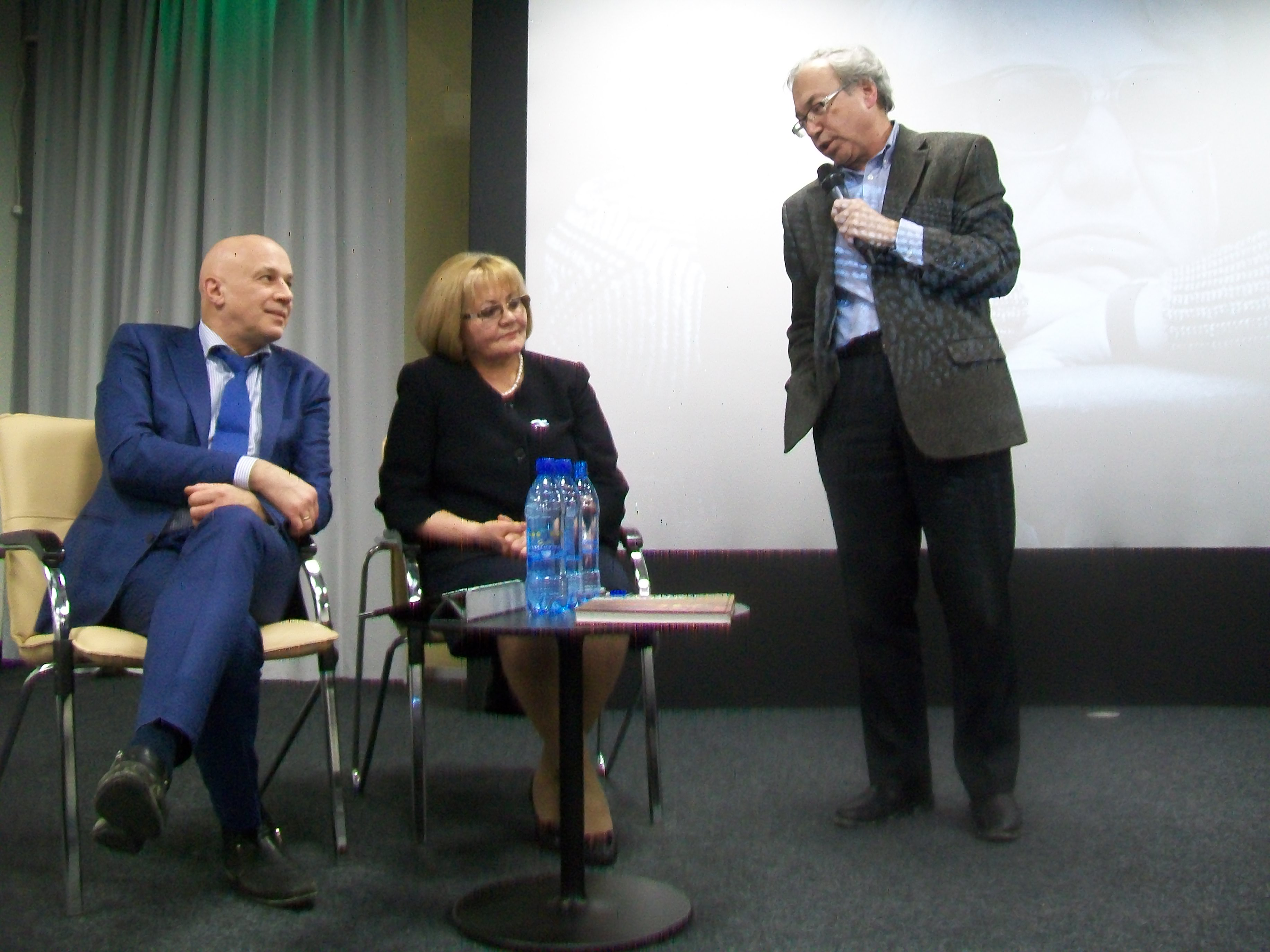 Людмила Валентиновна Бабушкина и Лев Абрамович Закс в Ельцин-центре на заседании Народной трибуны. Екатеринбург, 21 февраля 2017 года